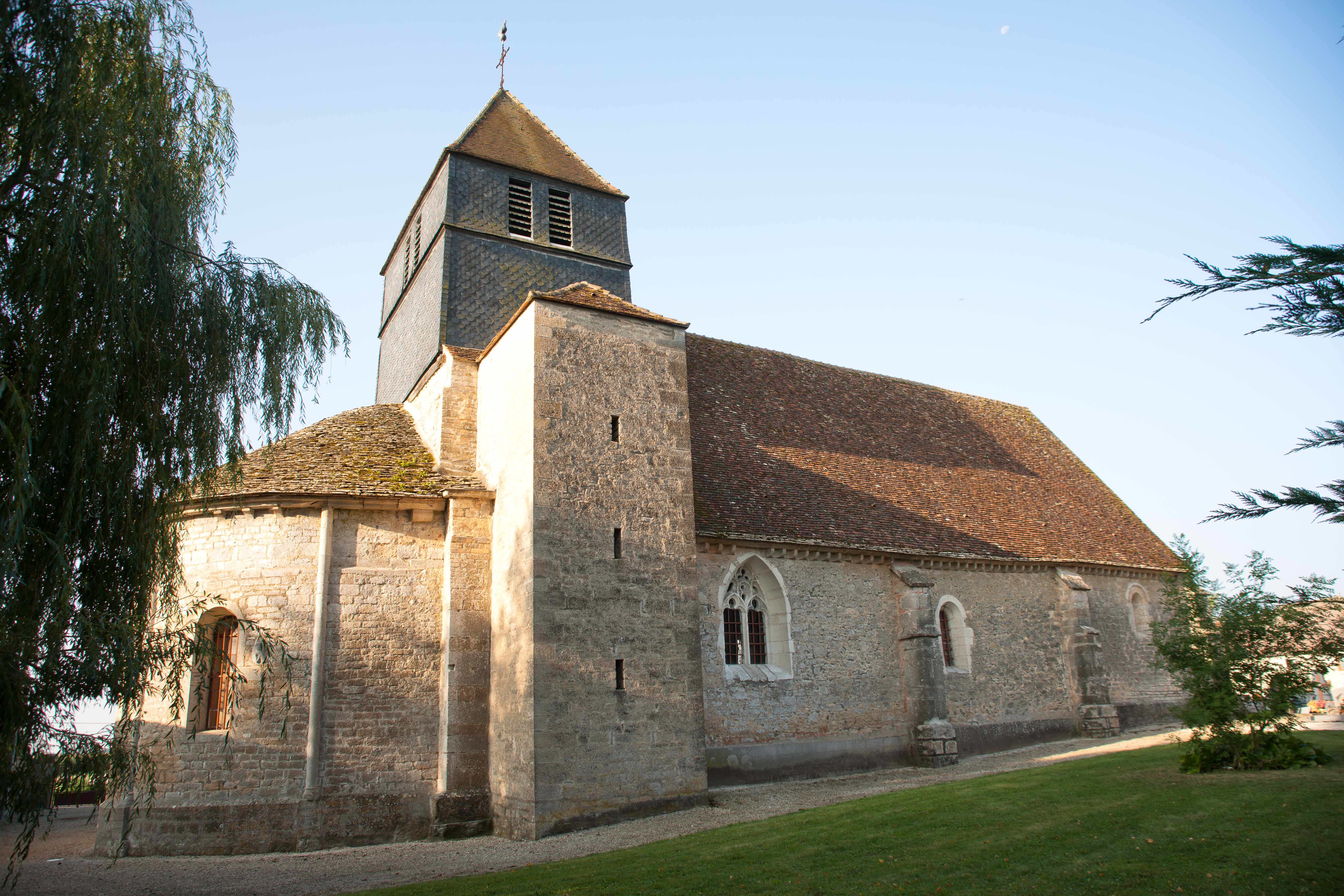 Église Saint-Révérien-et-Saint-Blaise de Villy-le-Moutier .